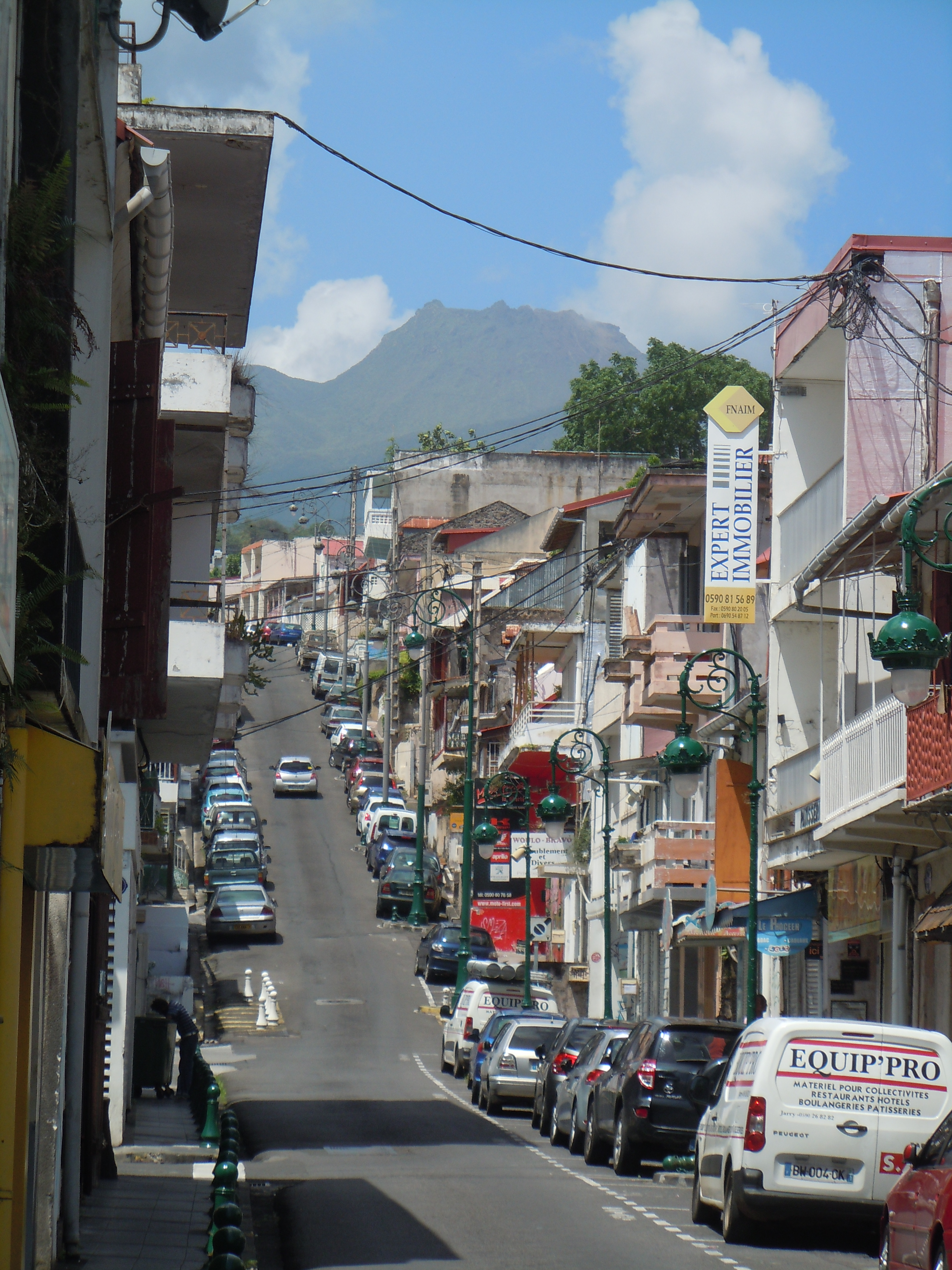 Rue Maurice Marie Claire - Basse-Terre - avec la Soufrière dans le prolongement.